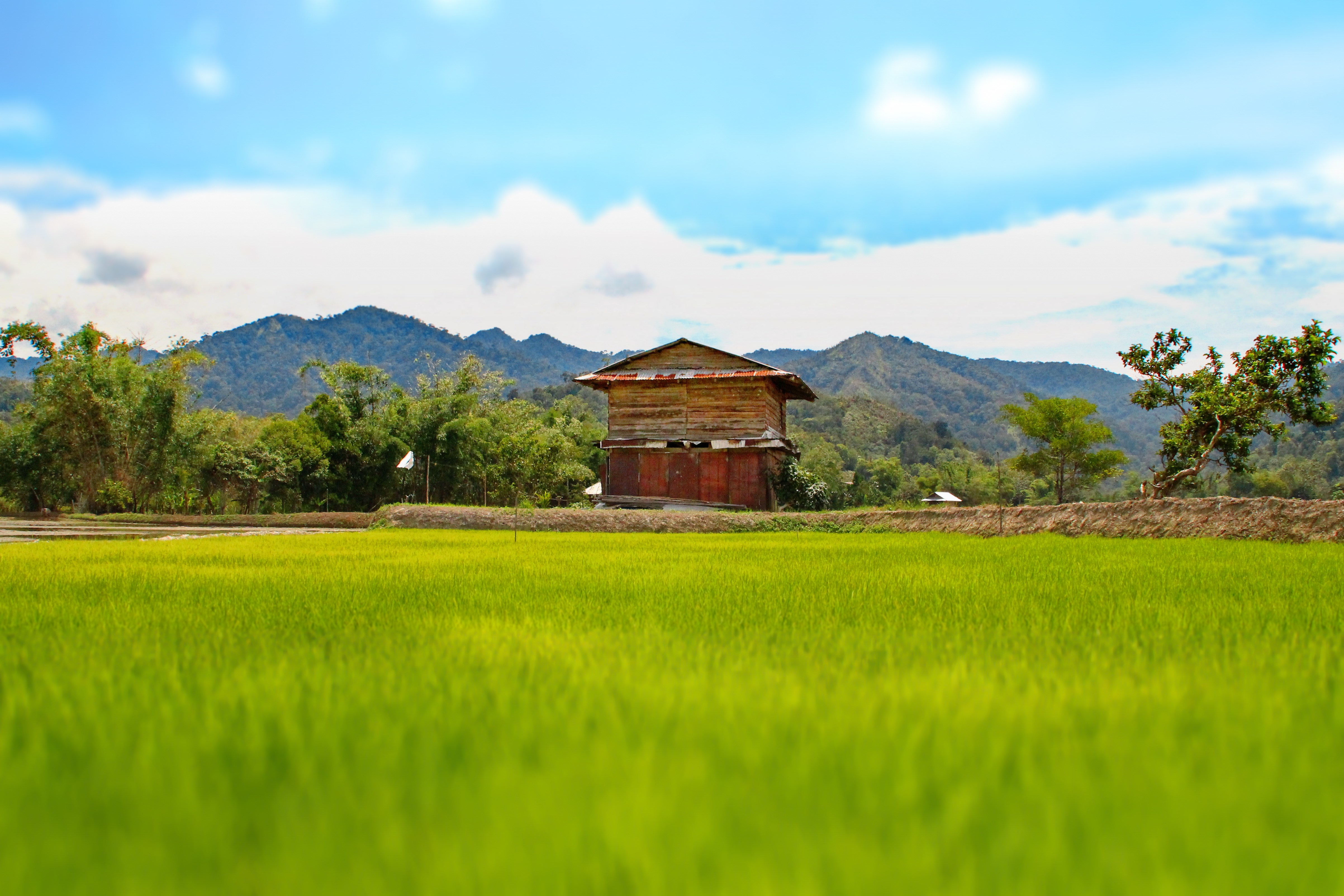 Bario